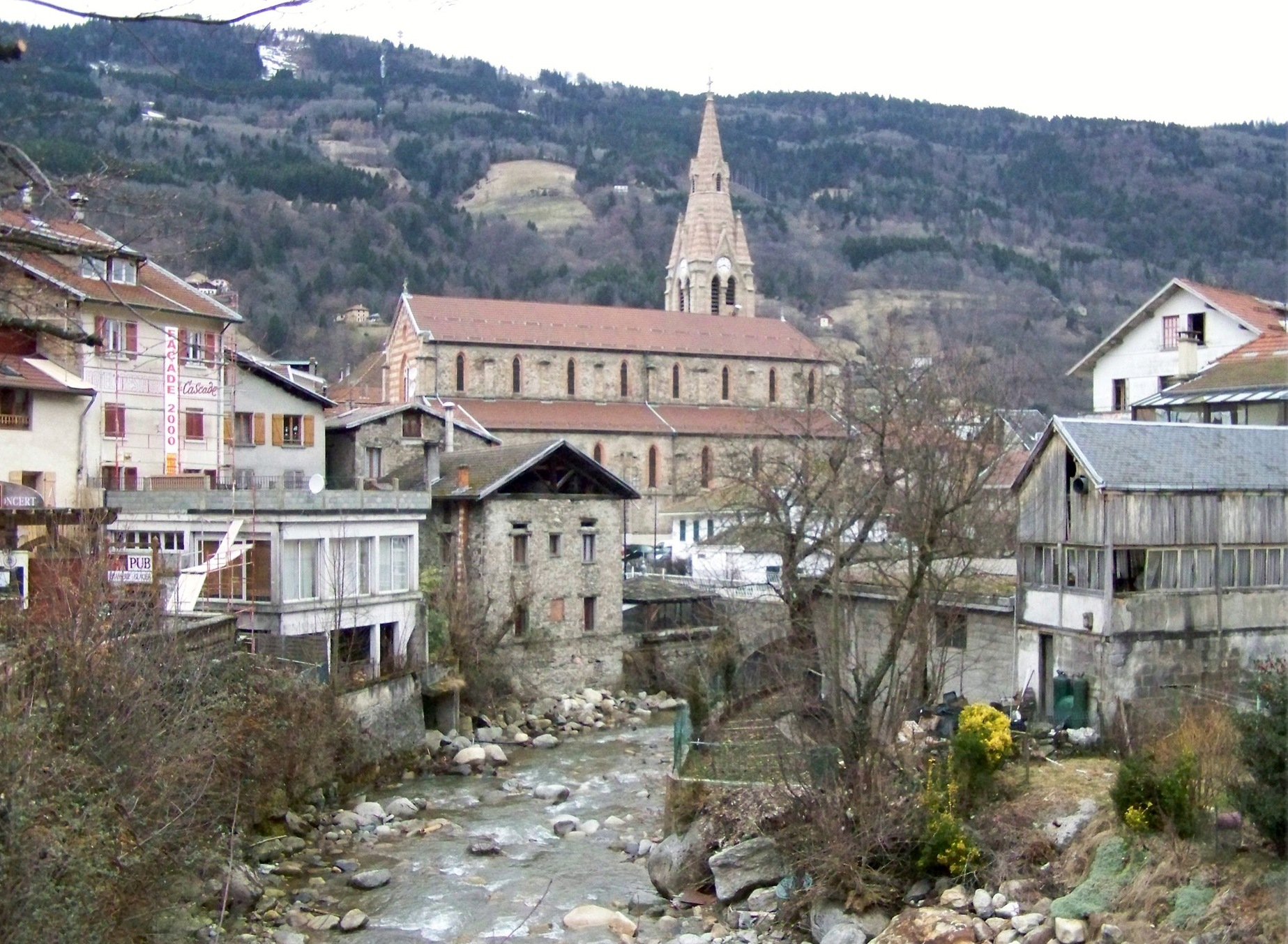 La Commune d'Allevard les bains (Isère, France). L'Église.